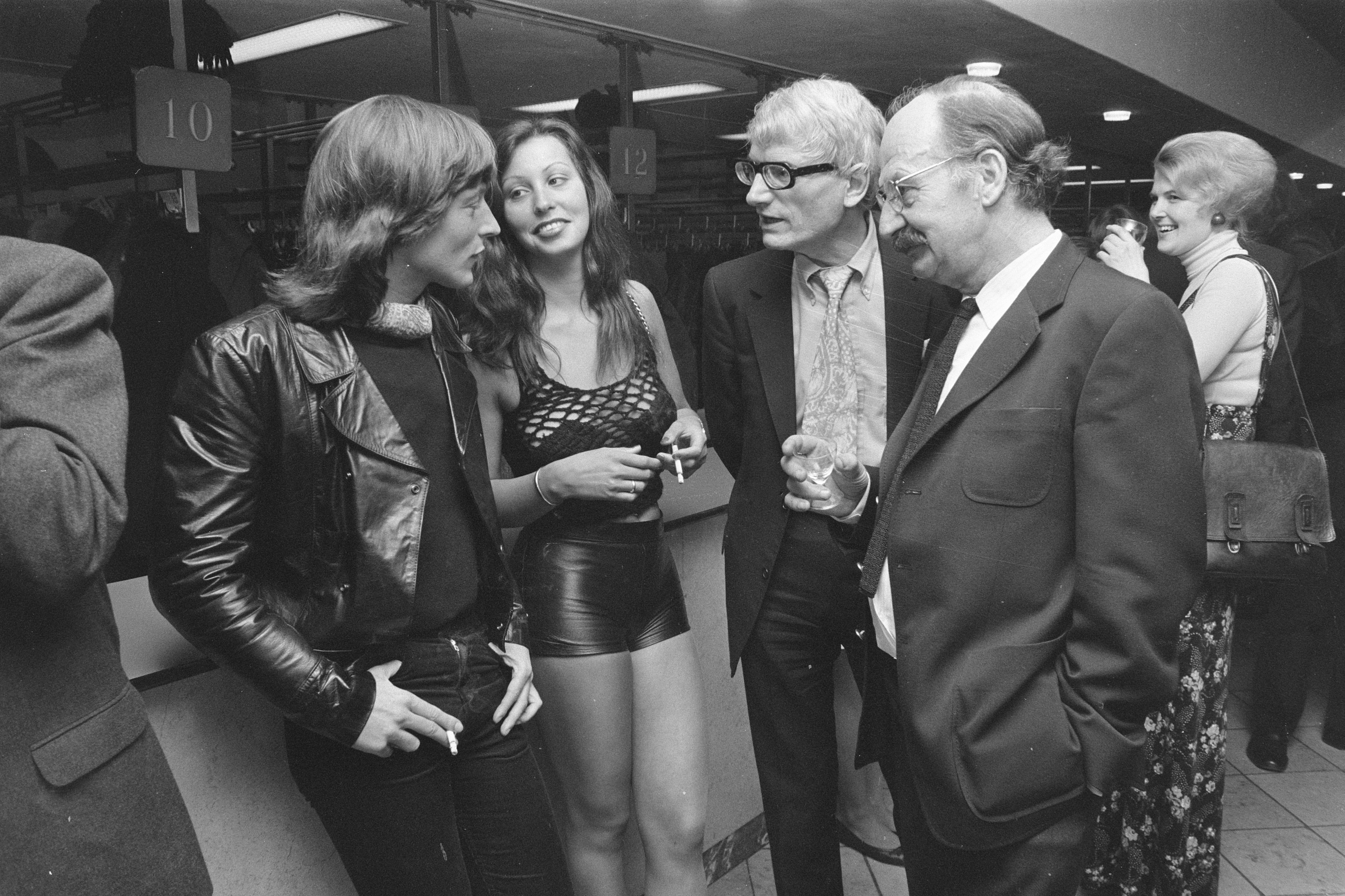 Boekenbal in Krasnapolsky te Amsterdam, v.l.n.r. Theo Kars (schrijver), diens echtgenote Karin B., Adriaan Morrien (schrijver) en Metten Koornstra (beeldend kunstenaar). 23 februari 1972